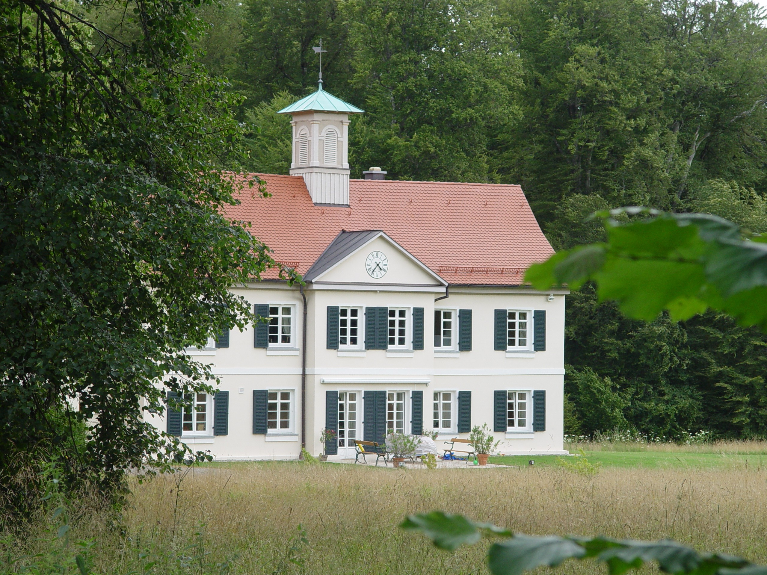 Jagdschloss im Wildpark Josefslust bei Sigmaringen